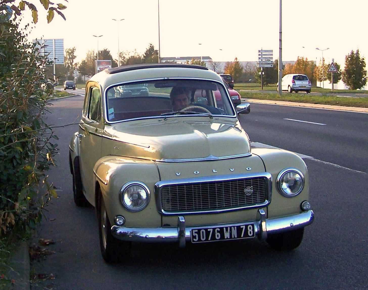 Vovo 544